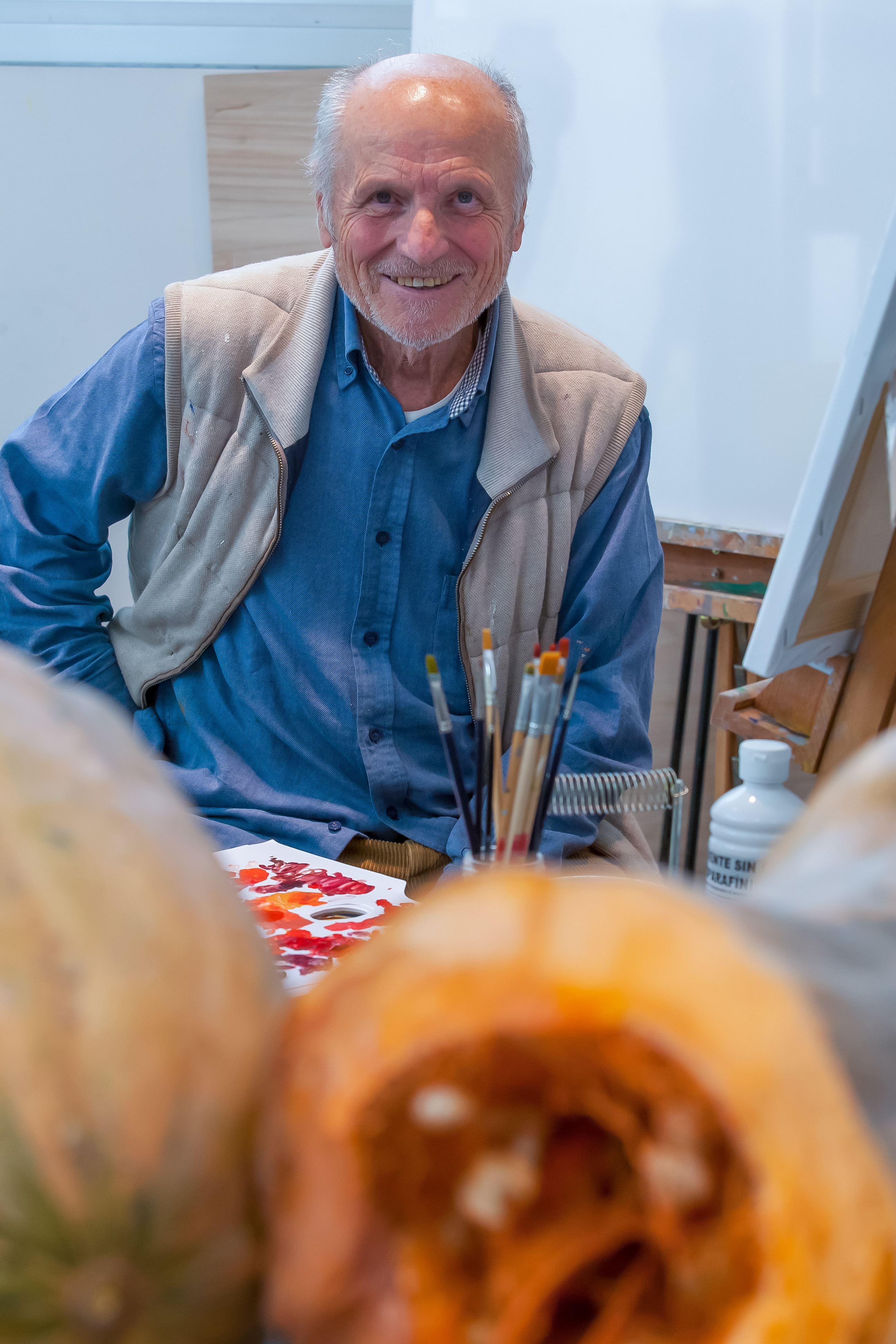 pintor y escultor español.